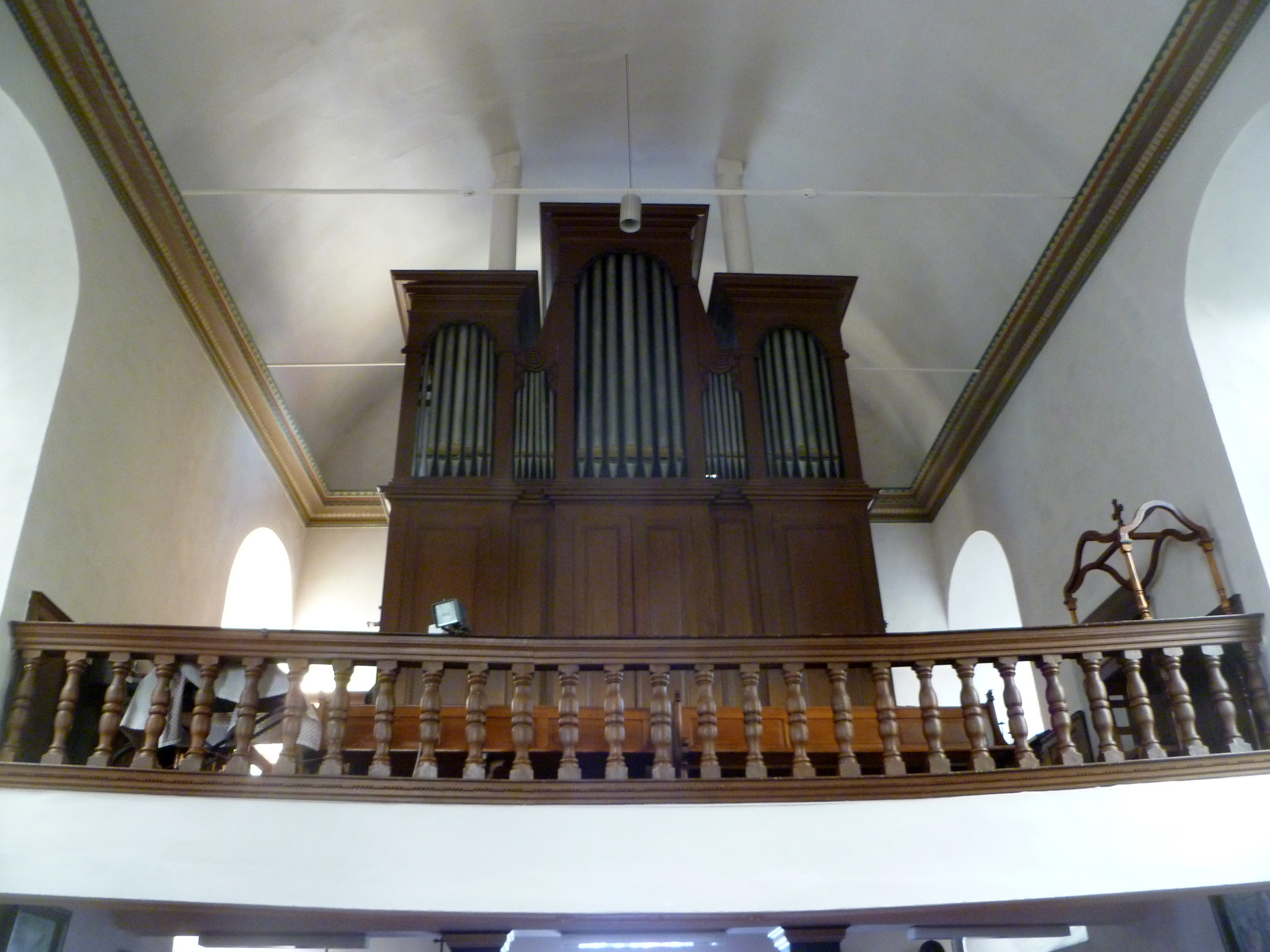 Orgelempore der Werthkapelle in Eupen